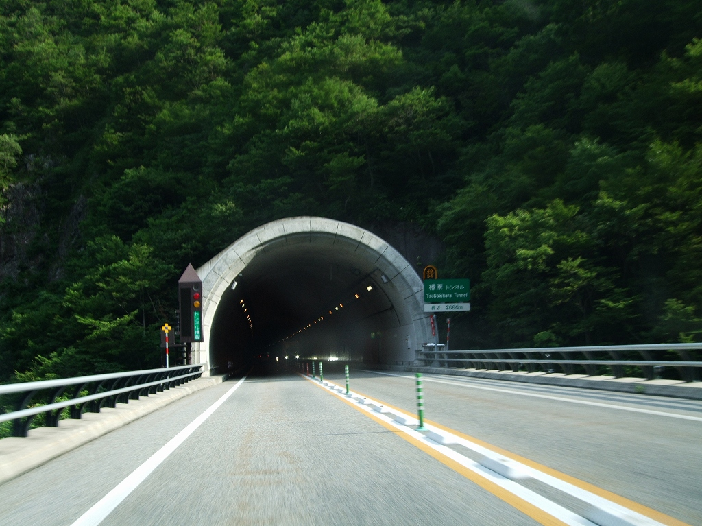 東海北陸自動車道 椿原トンネル（白川郷IC方面を撮影） 2008.7.15 投稿者が撮影